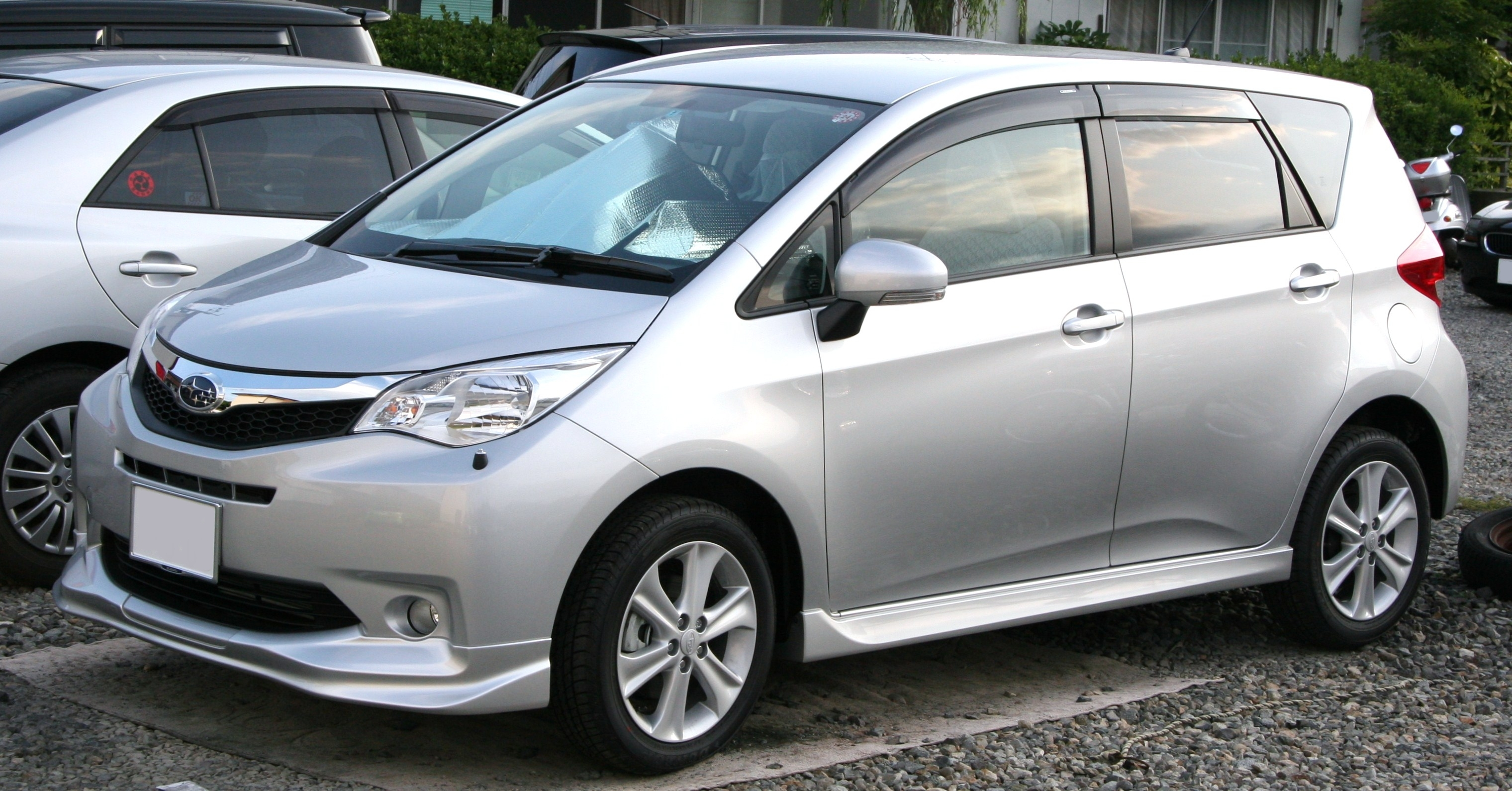 Subaru Trezia